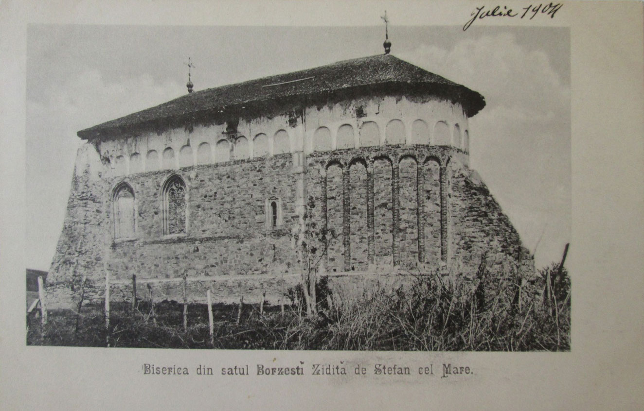 Biserica cu hramul „Adormirea Maicii Domnului” din Borzești, județul Bacău în anul 1904.